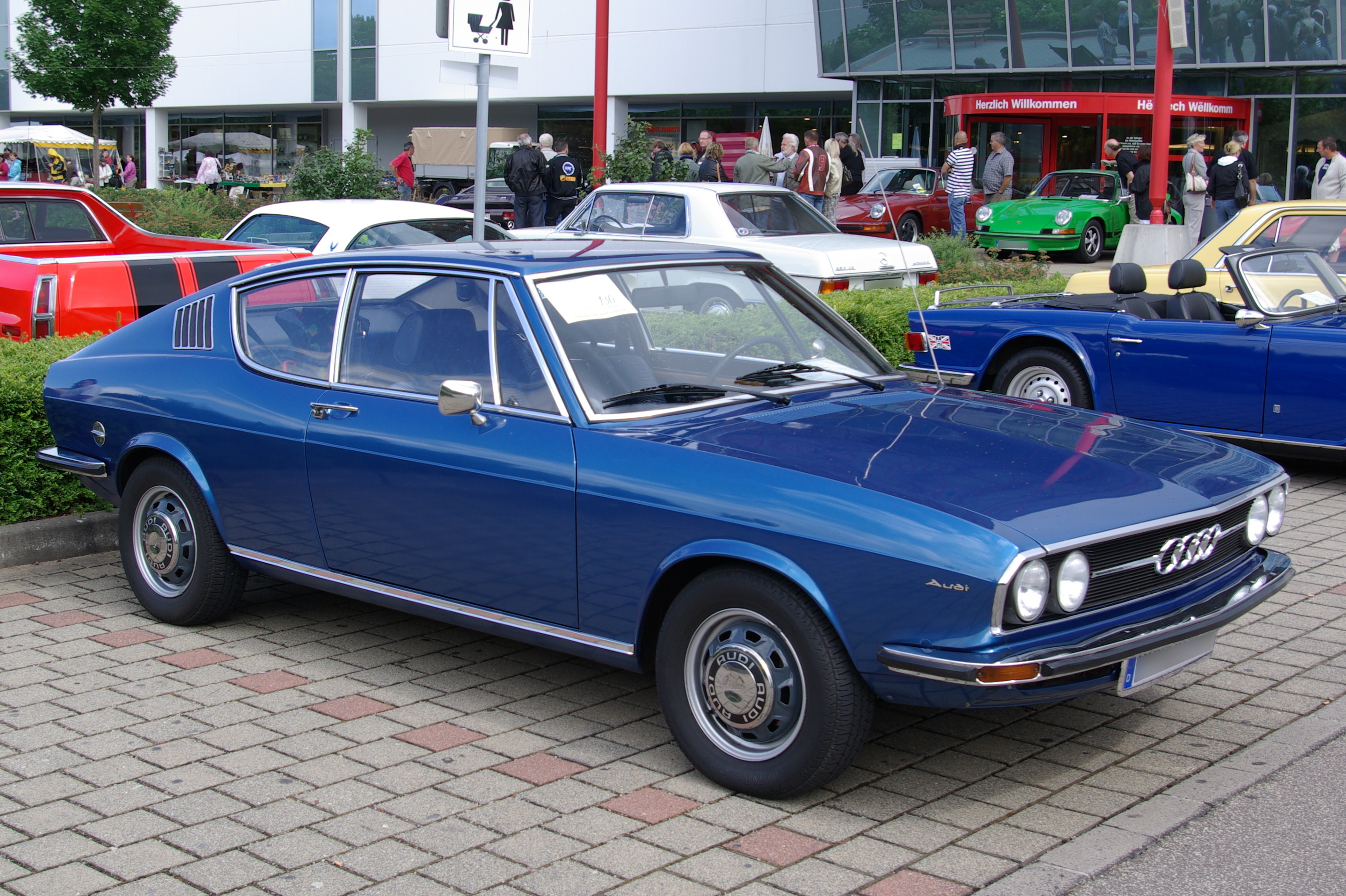 Audi 100 Coupé S, Baujahr 6.1976 Leistung 112 PS Hubraum 1858 cm² Leergewicht 1100 kg Höchstgeschwindigkeit 183 km/h